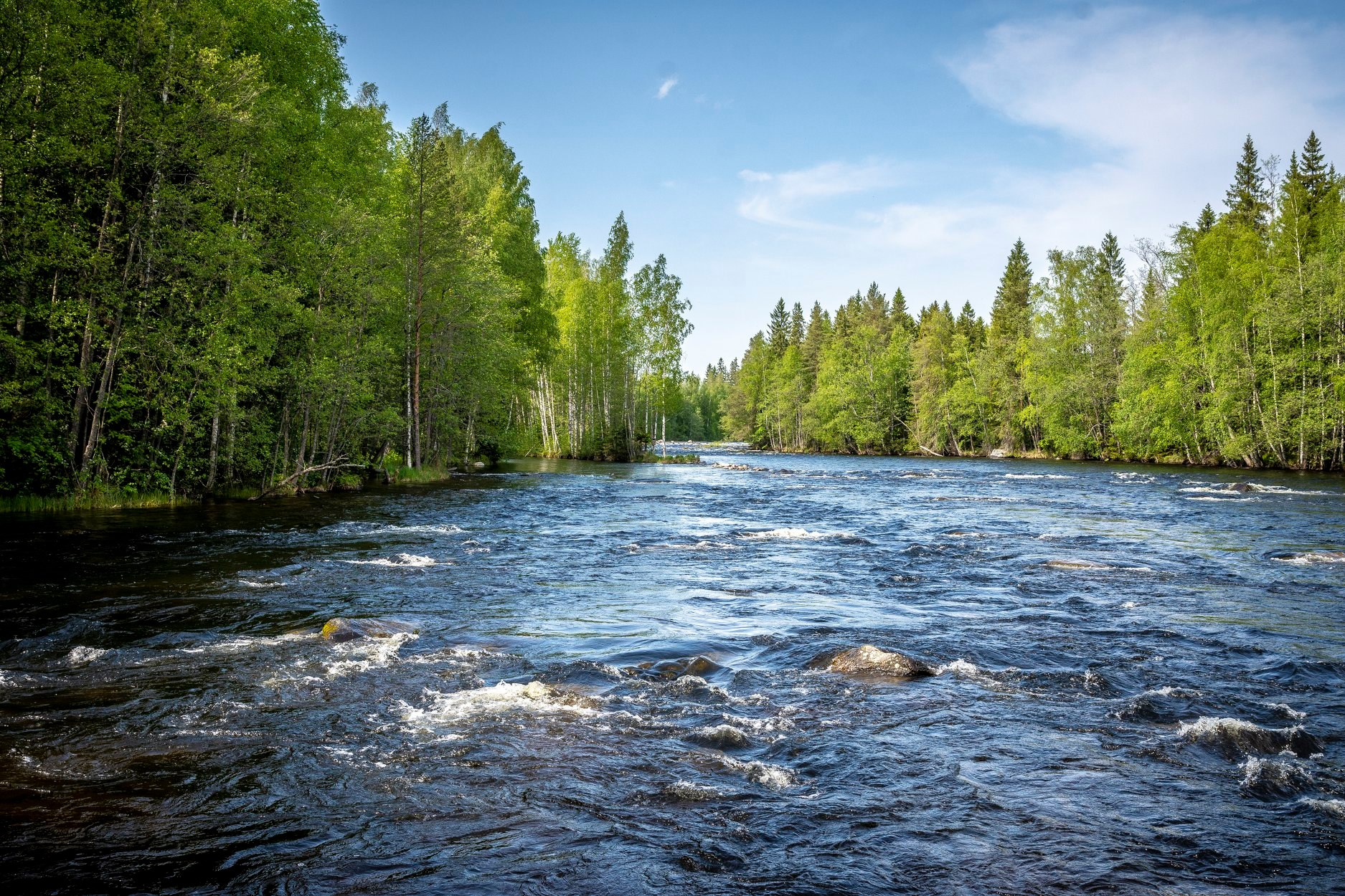 Kuva Konneveden koskireitin varrelta